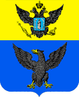 Беларуская (тарашкевіца): Герб Мазыра часоў Расейскай імпэрыі